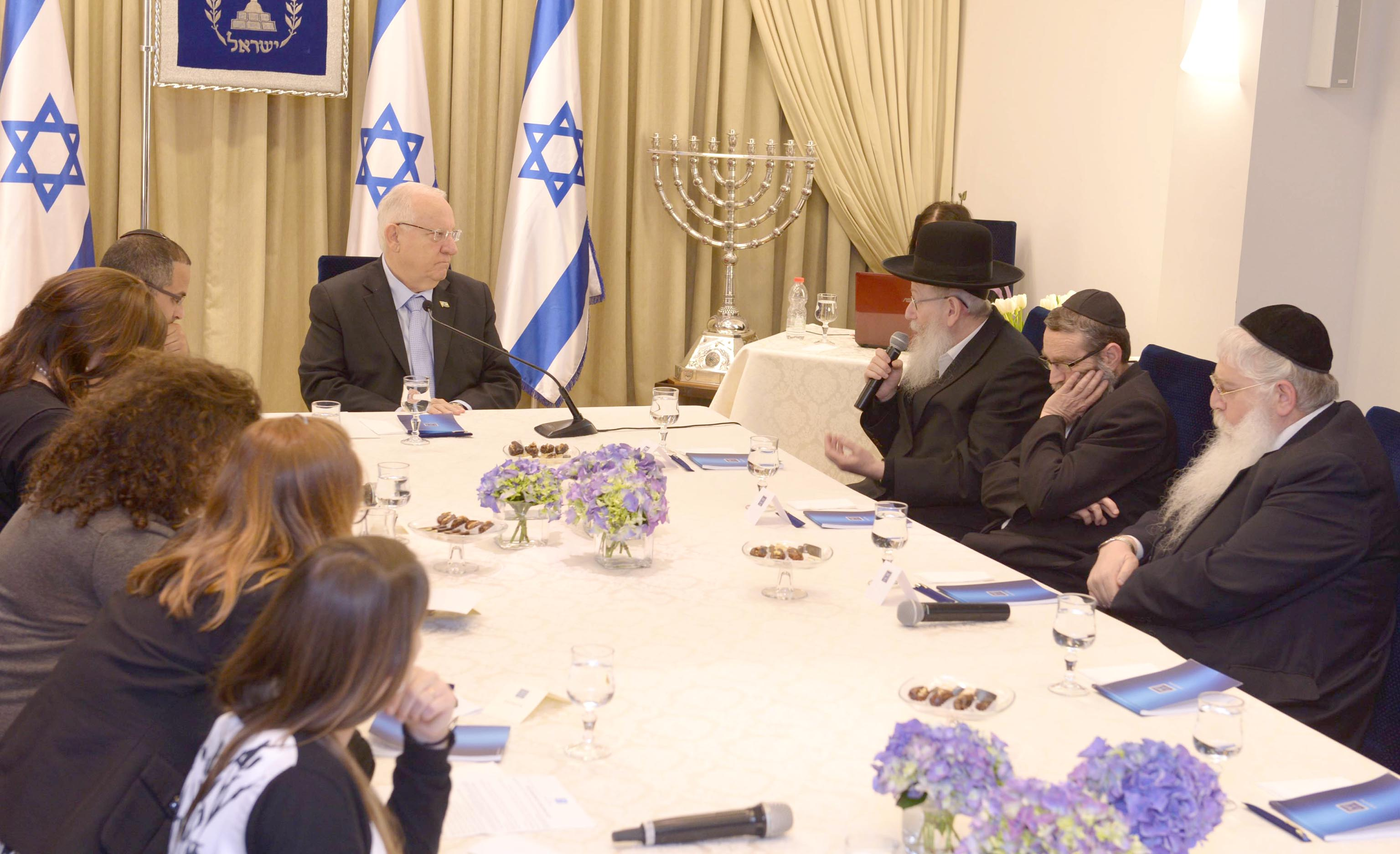 נשיא מדינת ישראל ראובן ריבלין פותח בהתייעצויות עם המפלגות השונות לקראת הרכבת הממשלה לאחר בחירות מרץ 2015 עם יהדות התורה